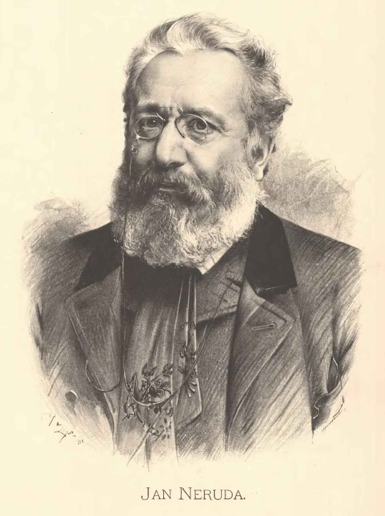 Portréty předních osobností od Jana Vilímka